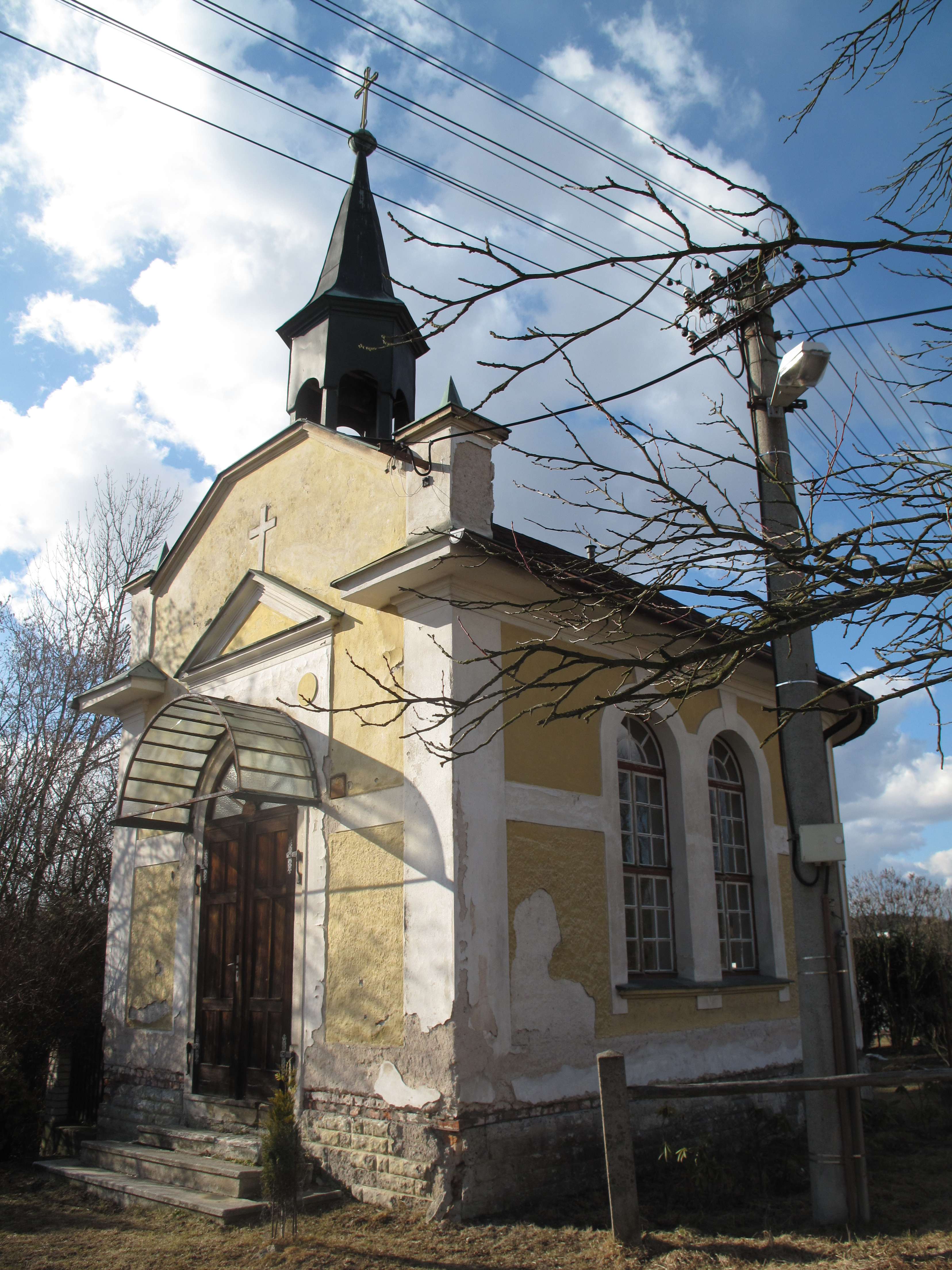 Lhota za Červeným Kostelcem, kaple